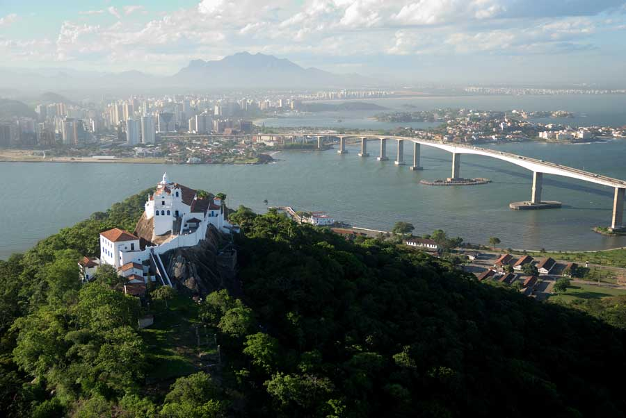 Convento da Penha e Terceira Ponte